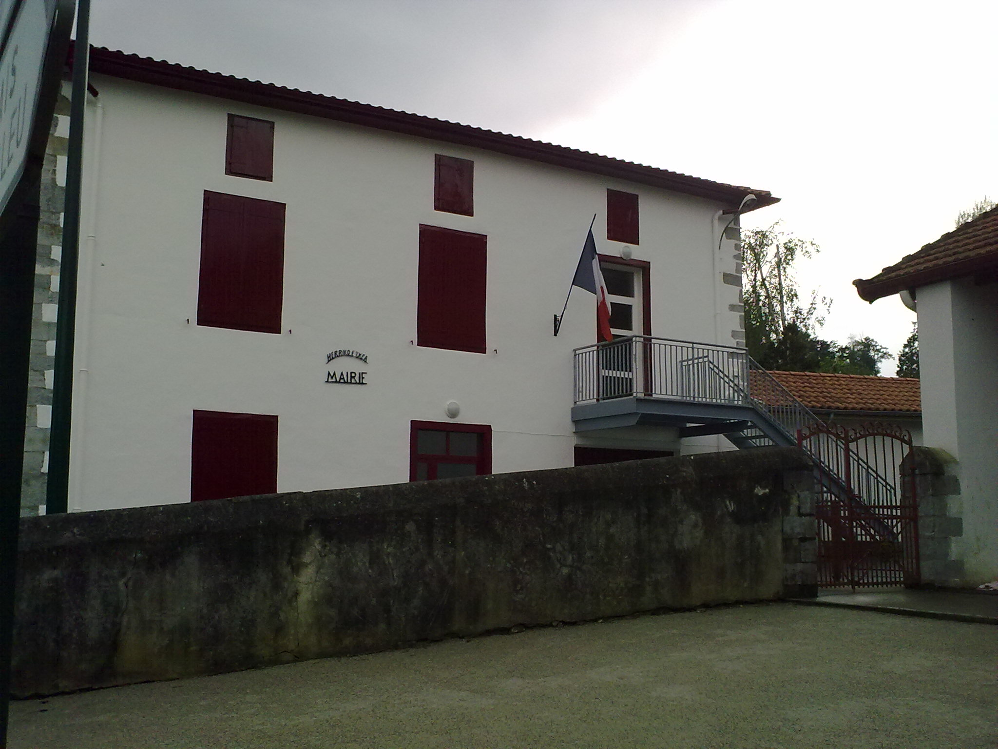 Uhart-Mixe, France